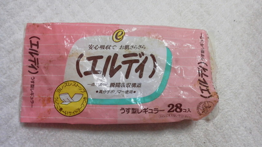 アンネエルディナプキン